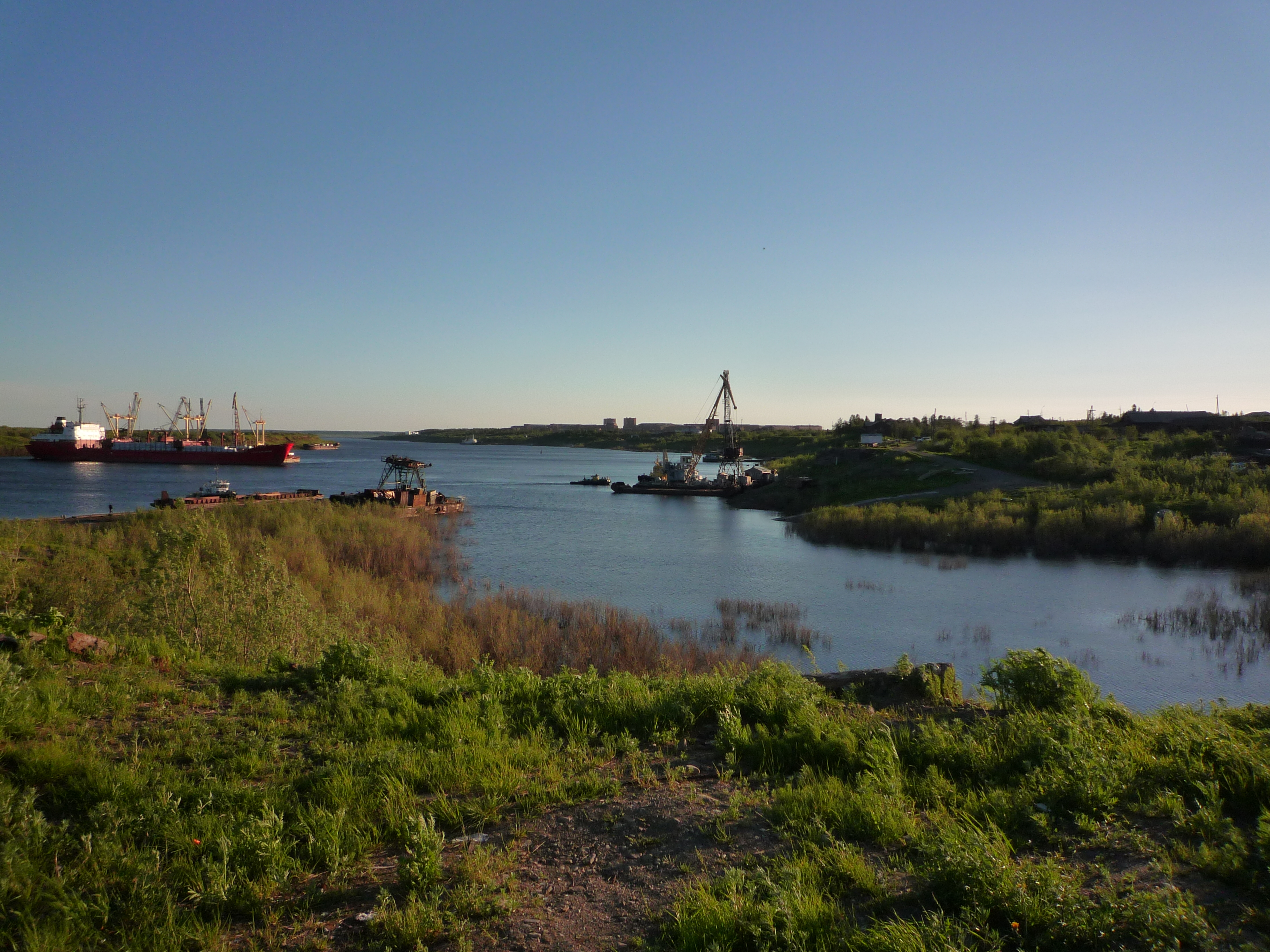 Полярный день над Игарской протокой